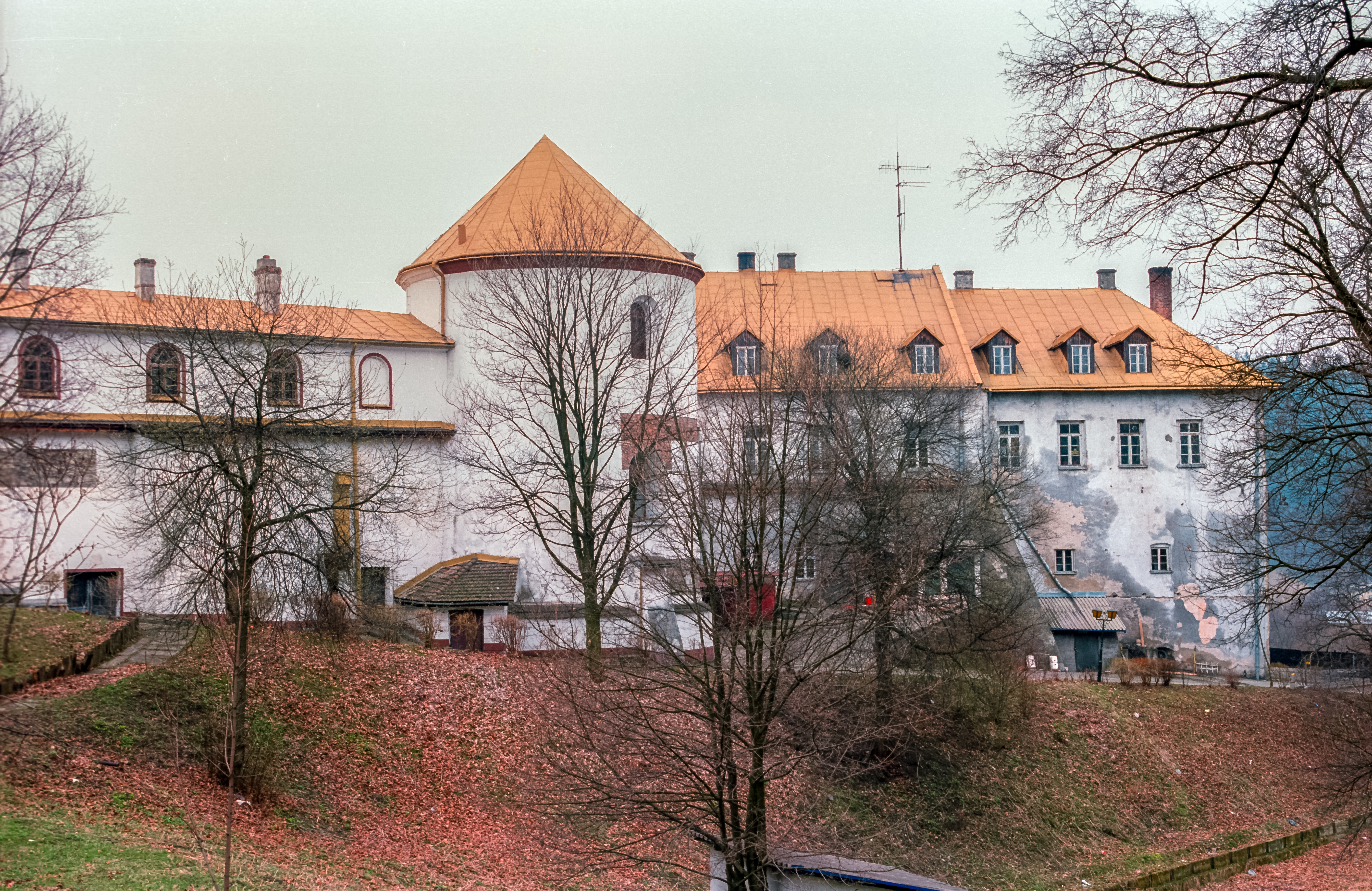 Lesko